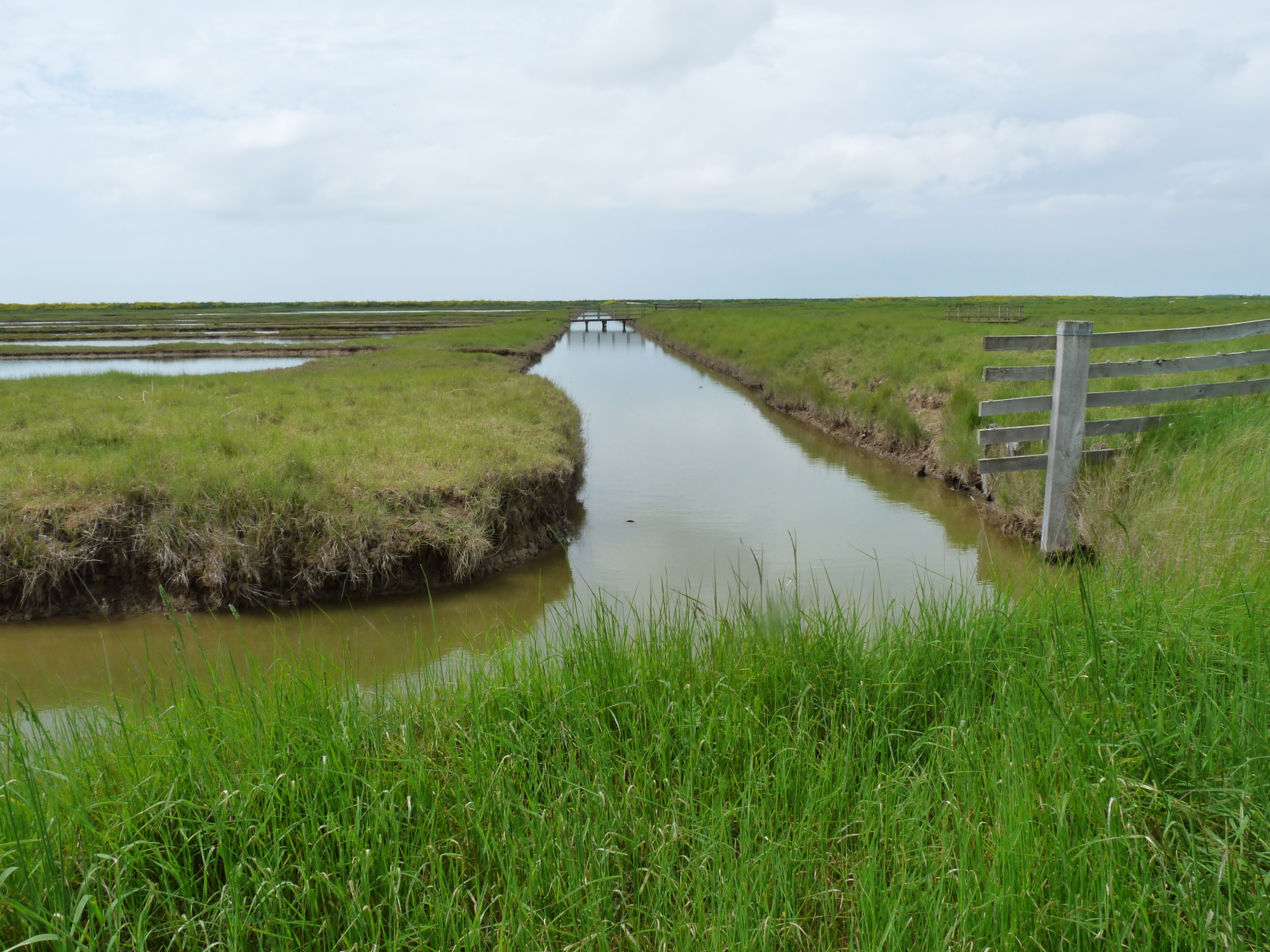 Réserve naturelle nationale de Moëze-Oléron : Sentier des Polders